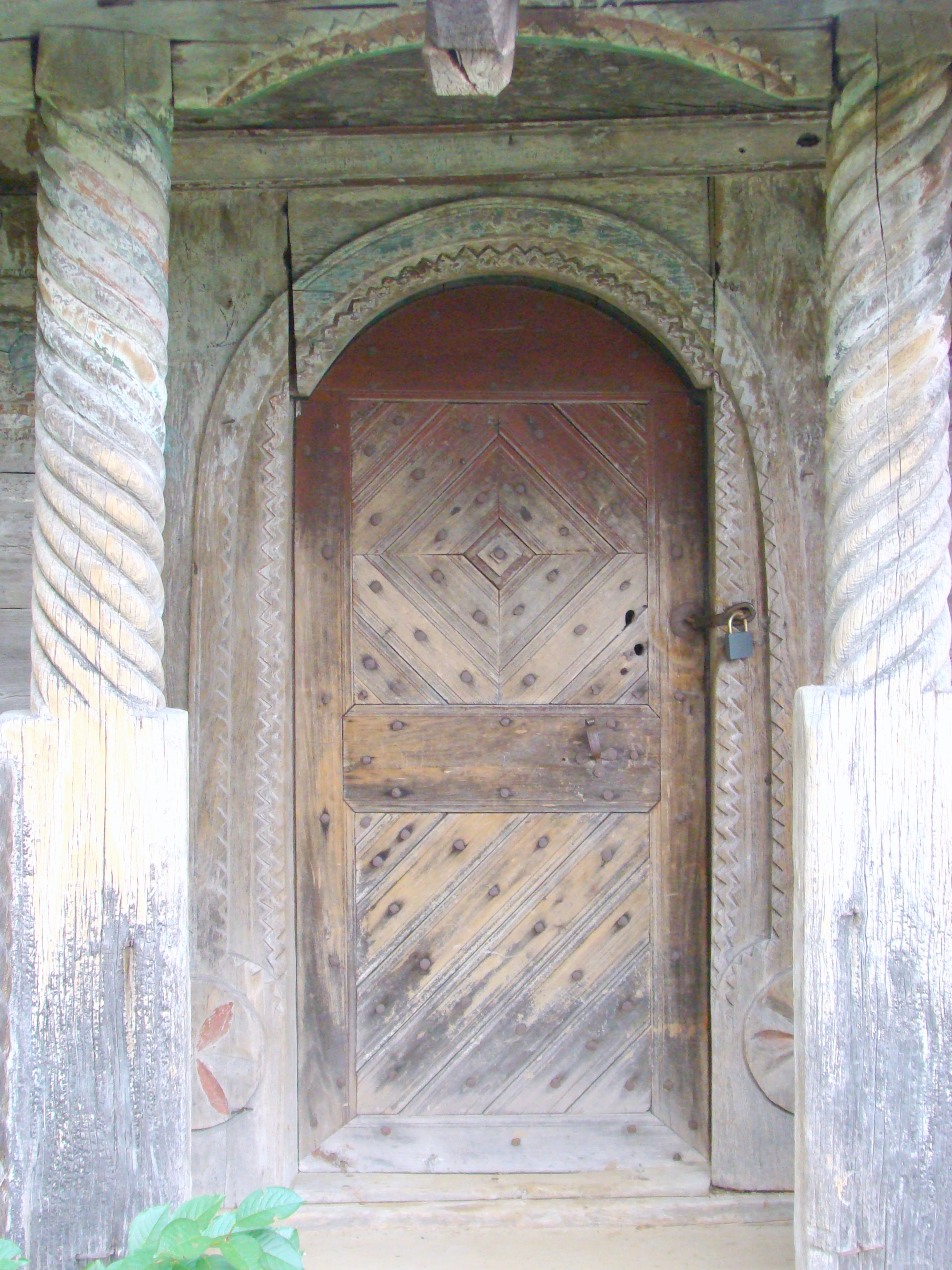 Biserica de lemn „Sf.Dumitru” din Schela-Cornet, județul Gorj